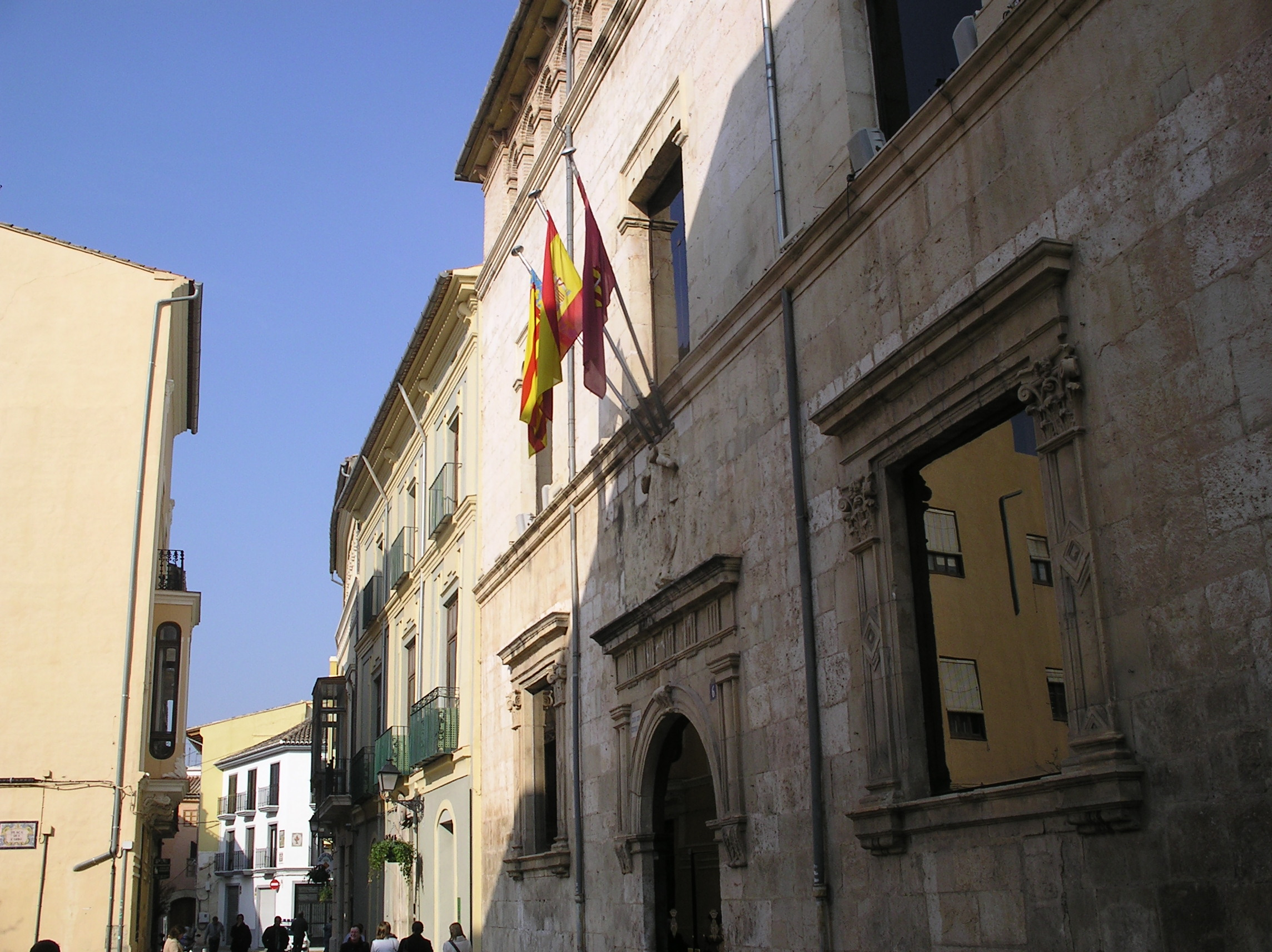 Vista del Ayuntamiento de Alzira, Valencia, España